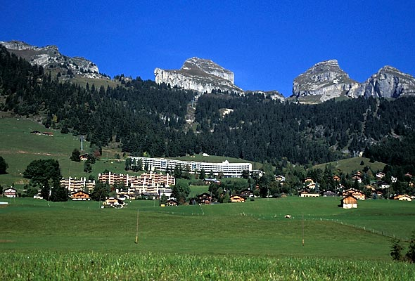 Leysin, im Hintergrund die Kalkstöcke von Tour d'Aï und Tour de Mayen